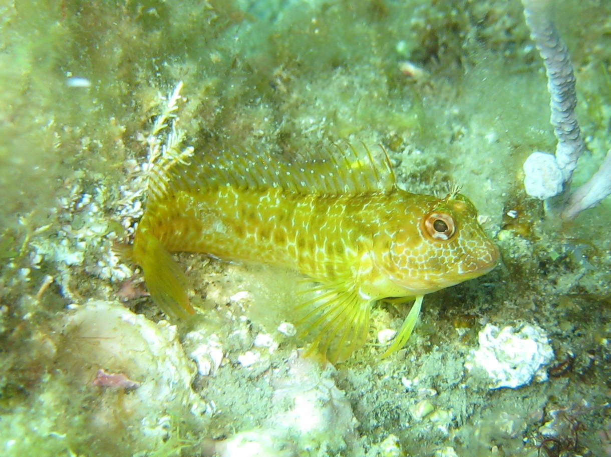 Blennie pilicorne (Parablennius pilicornis) en Méditerranée près de Banyuls